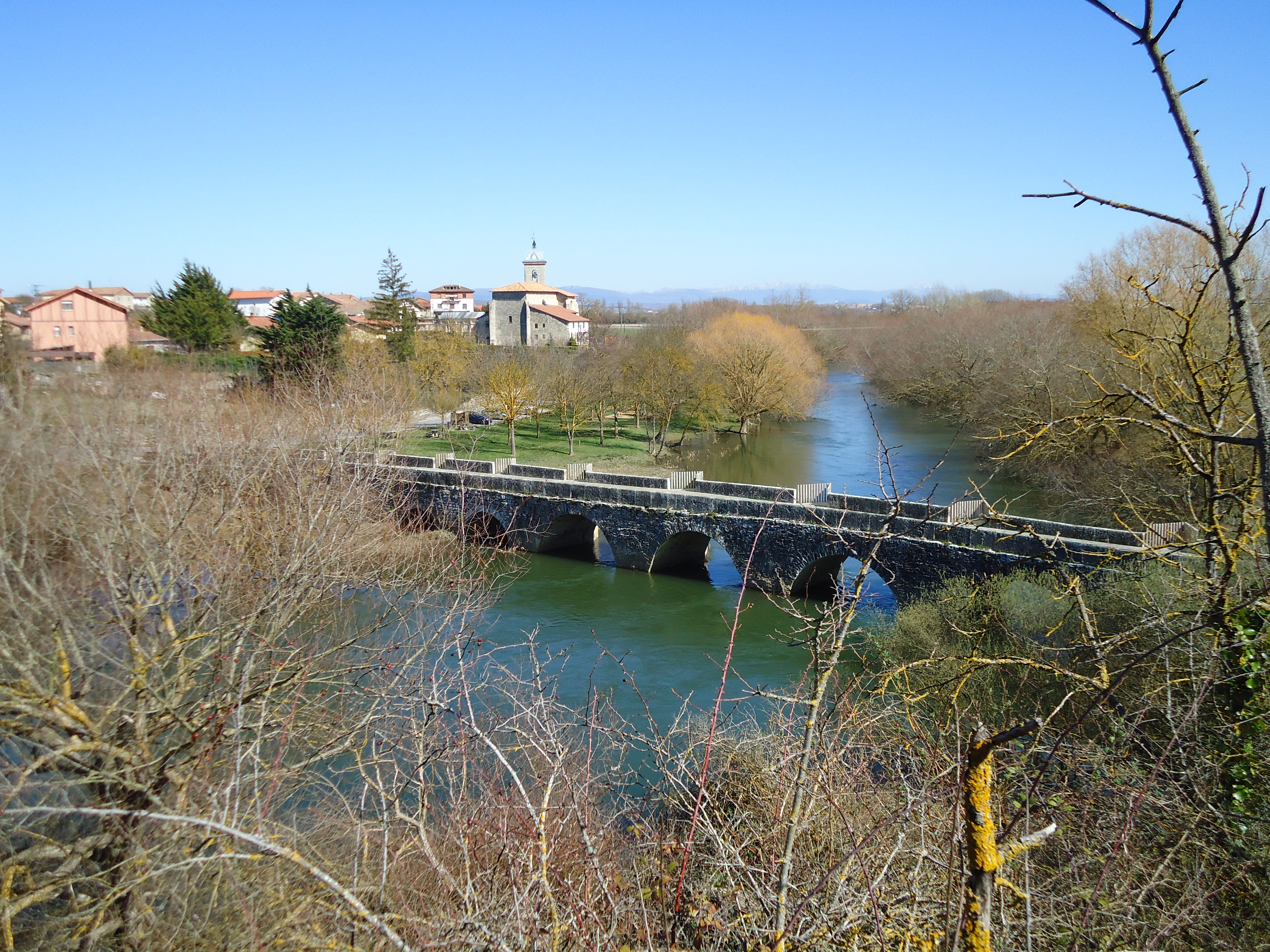 Trespondeko eliza, zubia eta Zadorra ibaia (Iruña Oka, Araba)